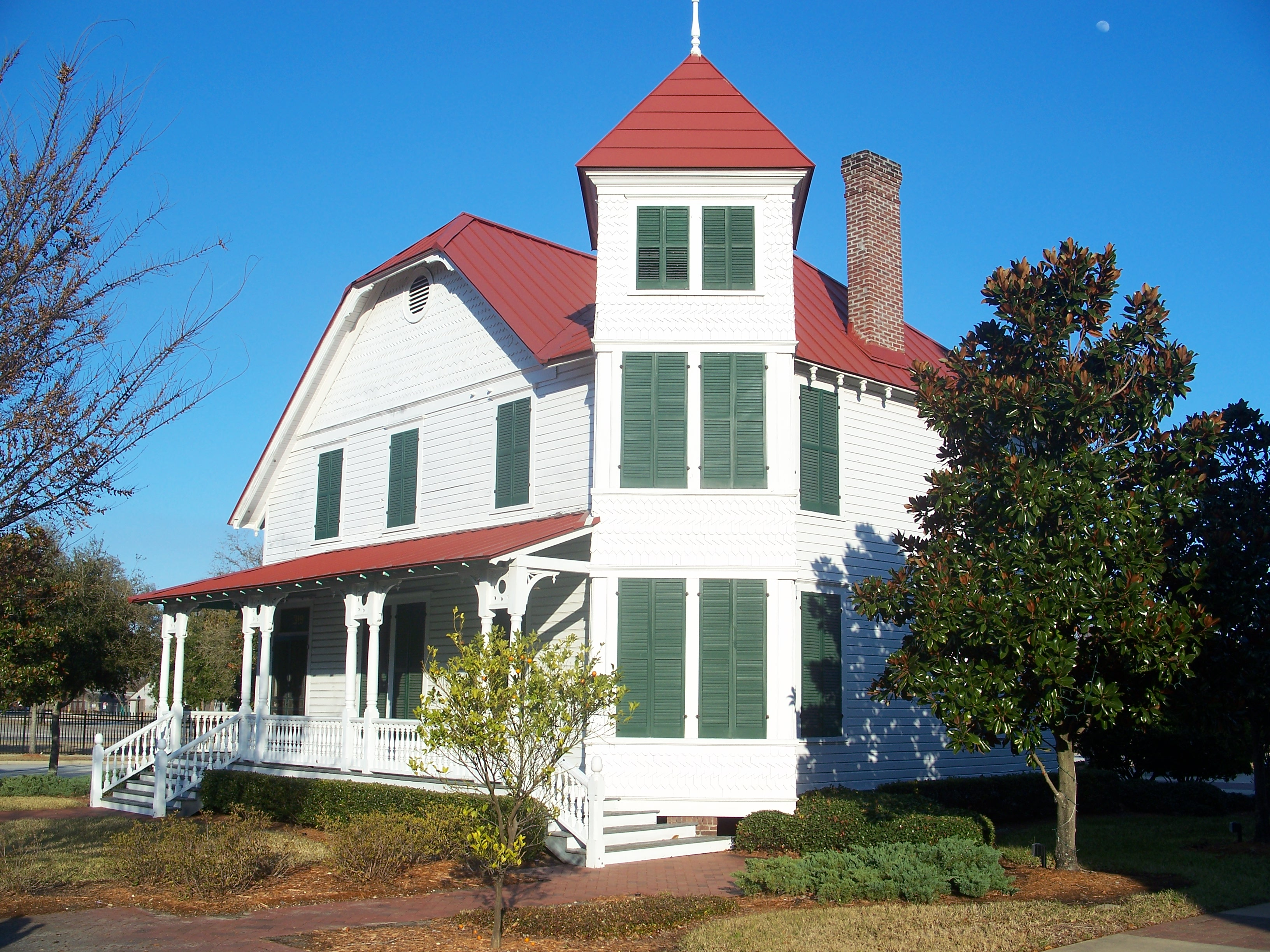 Jacksonville, Florida: Merrill House museum